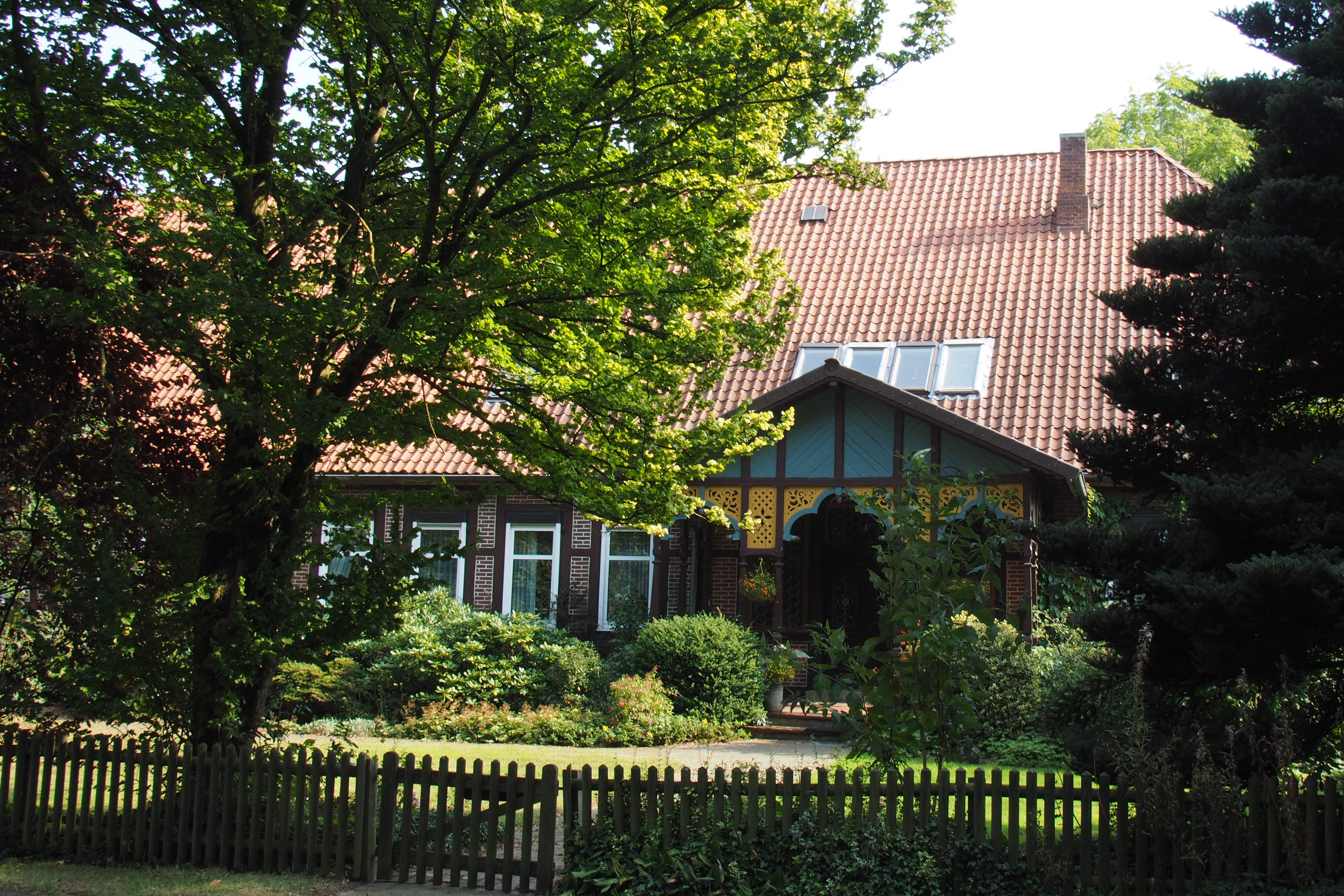 Bauernhof in Meinholz Gemeinde Wietzendorf, Heidekreis